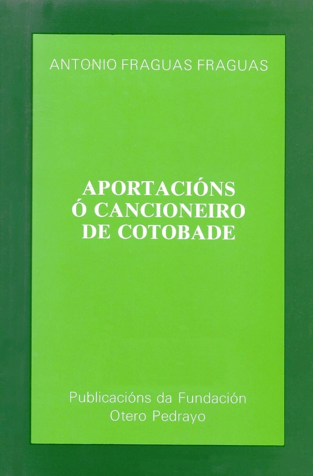 Aportacións ó cancioneiro de Cotobade, Publicacións da Fundación Otero Pedrayo.